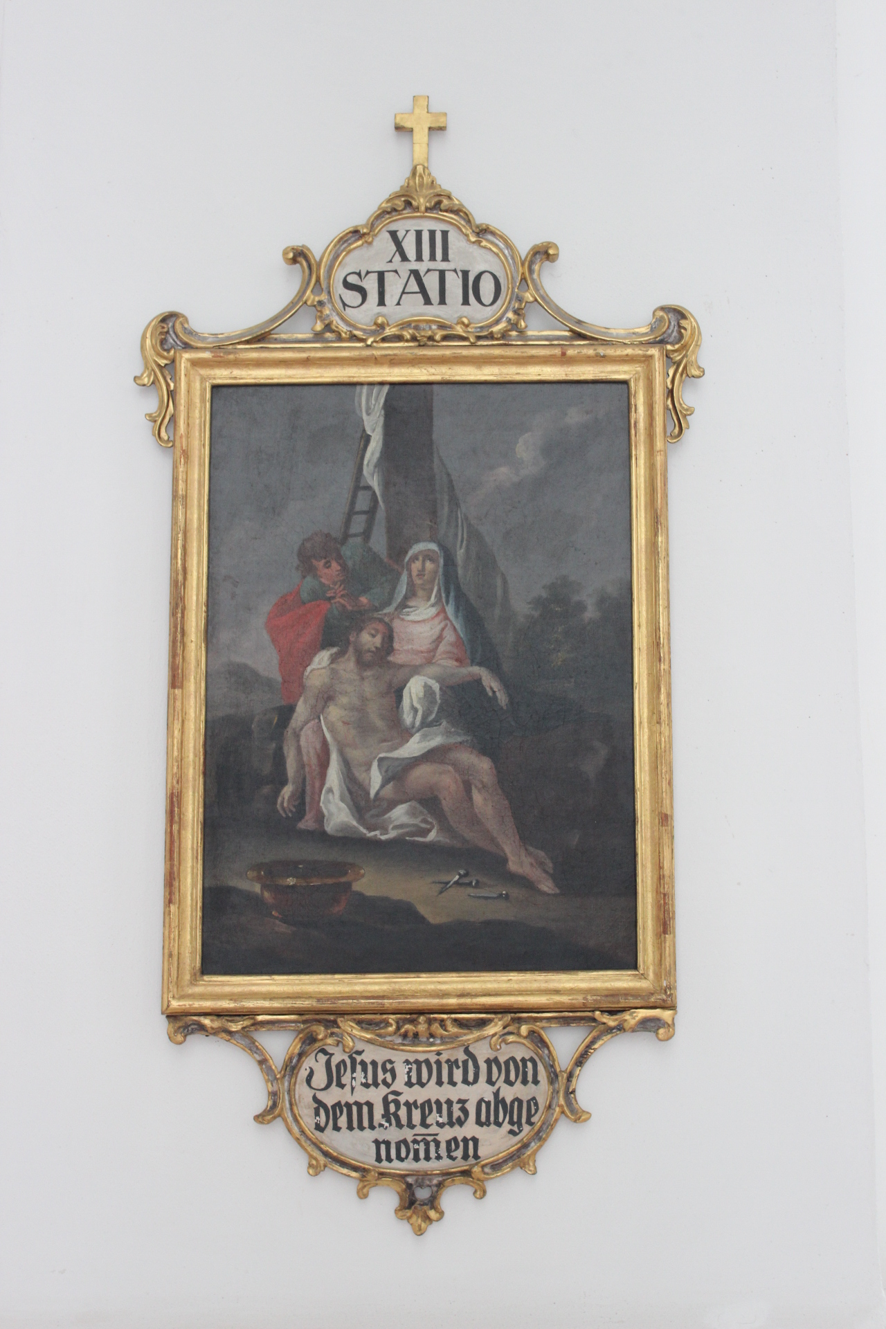 13. Station des Kreuzwegs der Heidelberger Jesuitenkirche